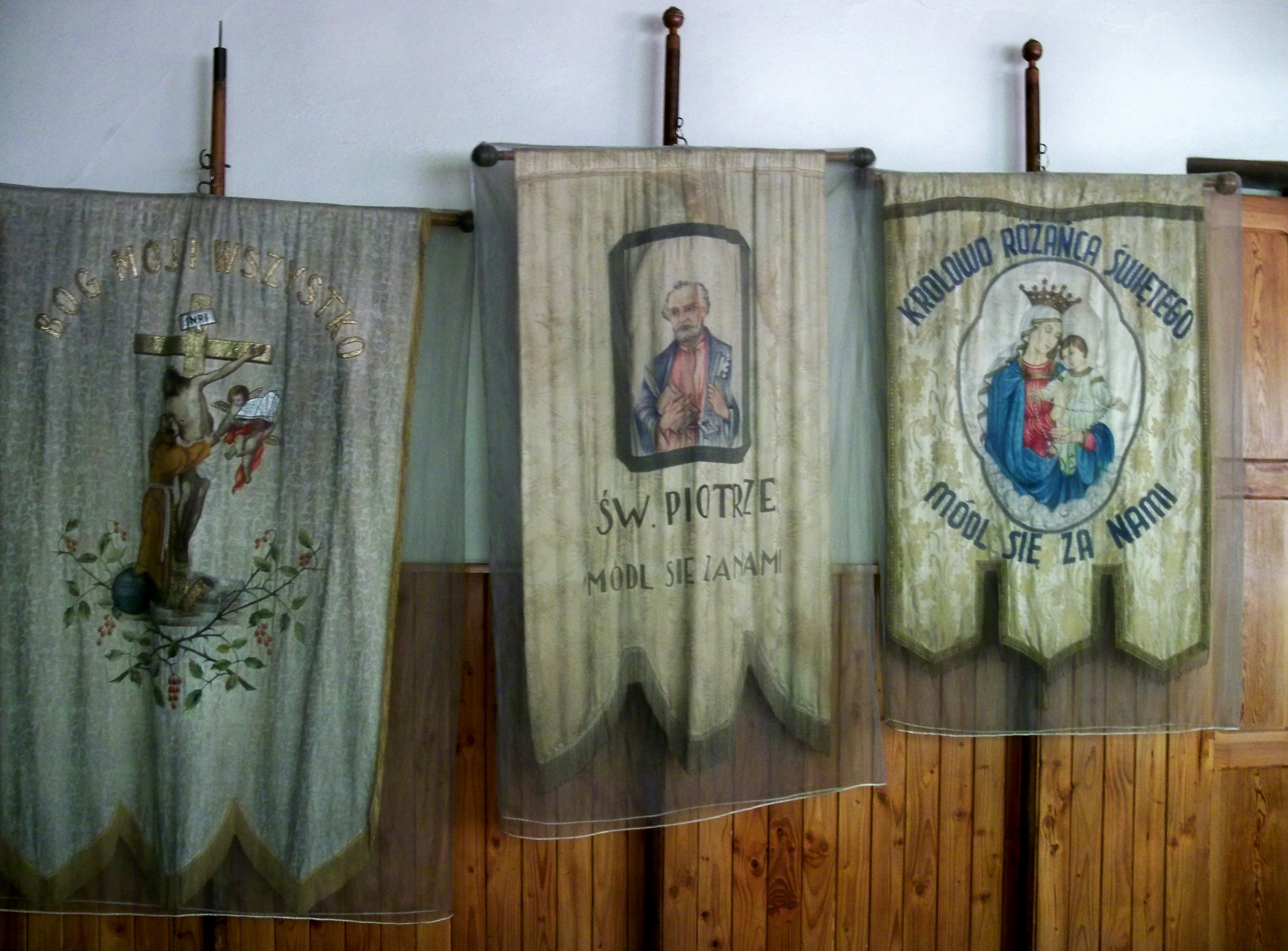 Kościół św. Piotra Apostoła w Międzyzdrojach. Chorągwie procesyjne z napisami "Bóg mój i wszystko", "Św. Piotrze, módl się za nami" i "Królowo Różańca Świętego, módl się za nami".